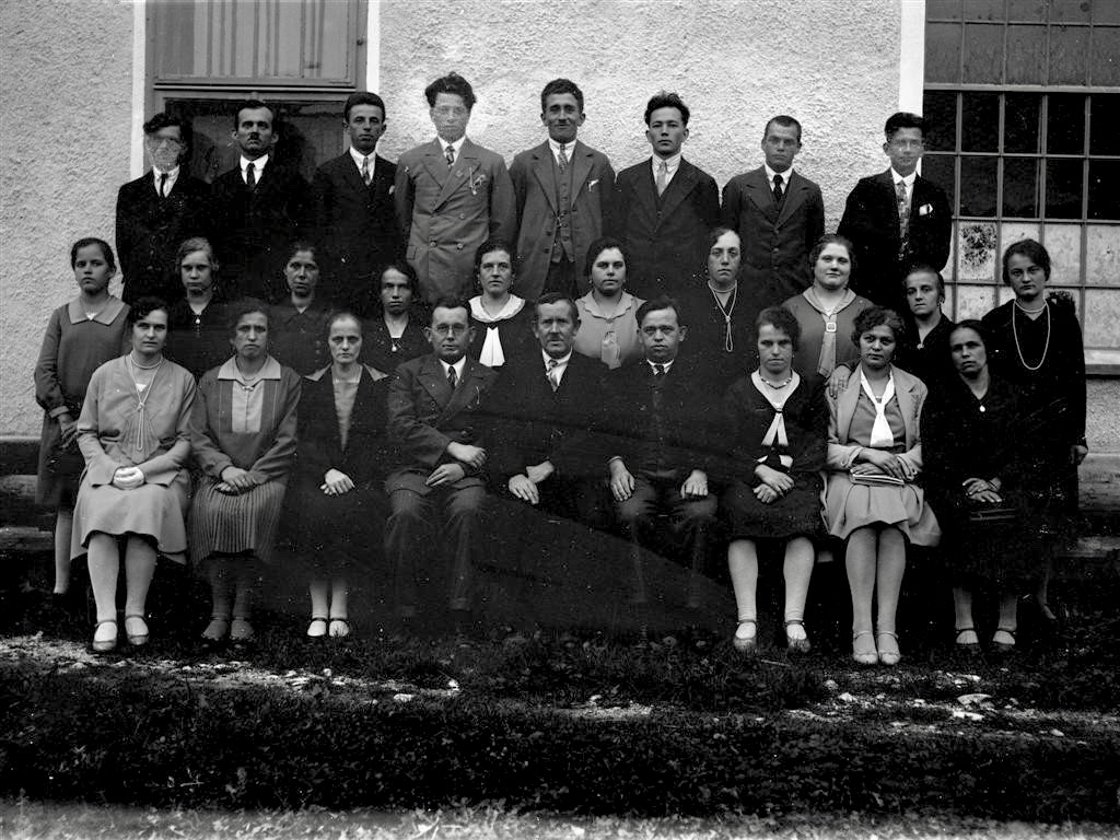 Kolektiv tovarne Brata Naglič.